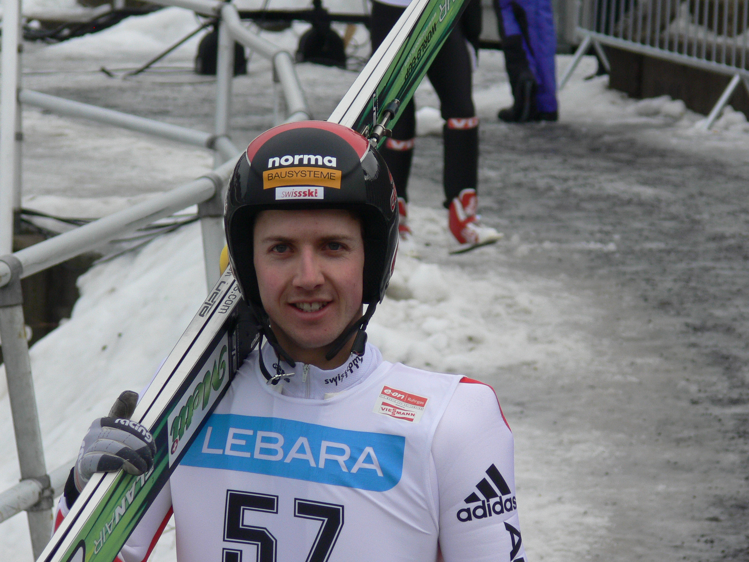 Swiss skijumper Simon Ammann